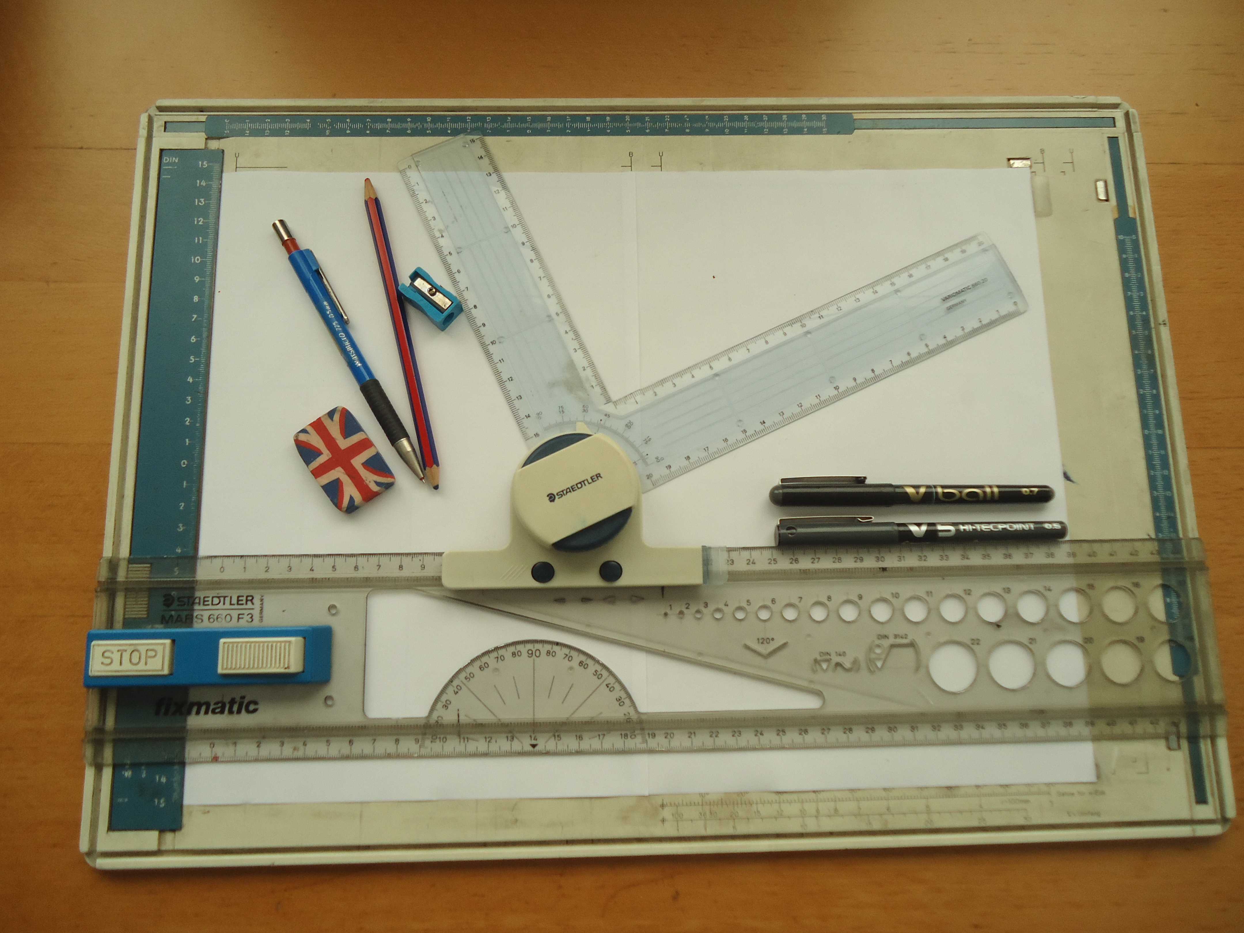 Utensilios de dibujo técnico para escritorio. Tabla "Paralex" tamaño A-3